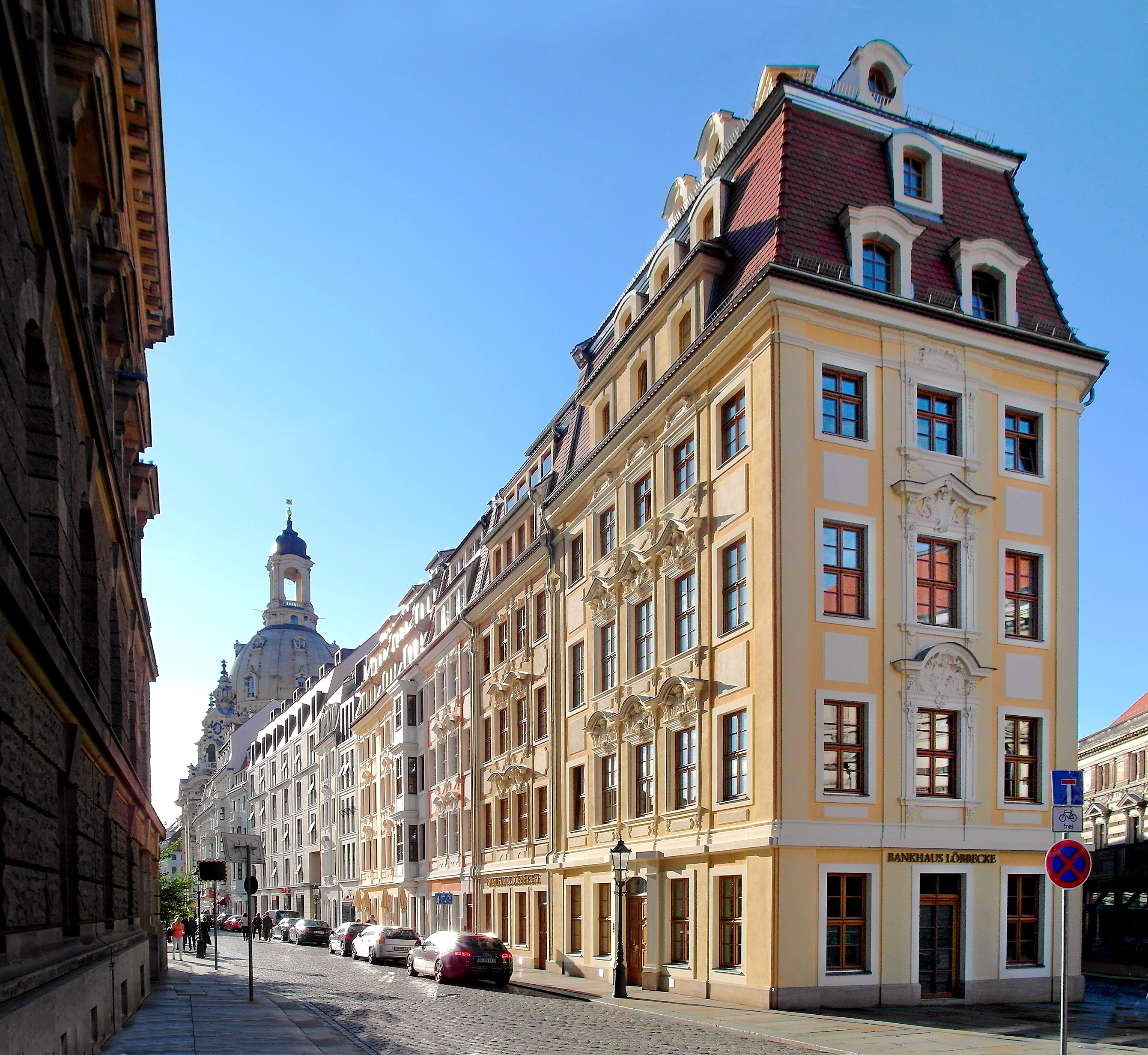 16.08.2014 Dresden Neumarkt: Blick von Osten entlang der Rampischen Straße, beginnend mit dem Eckhaus 33 (GMP:51.051387,13.744094), dann 31, 29, ... bis zur Frauenkirche [SAM5452.JPG]20140816120DR. JPG(c)Blobelt